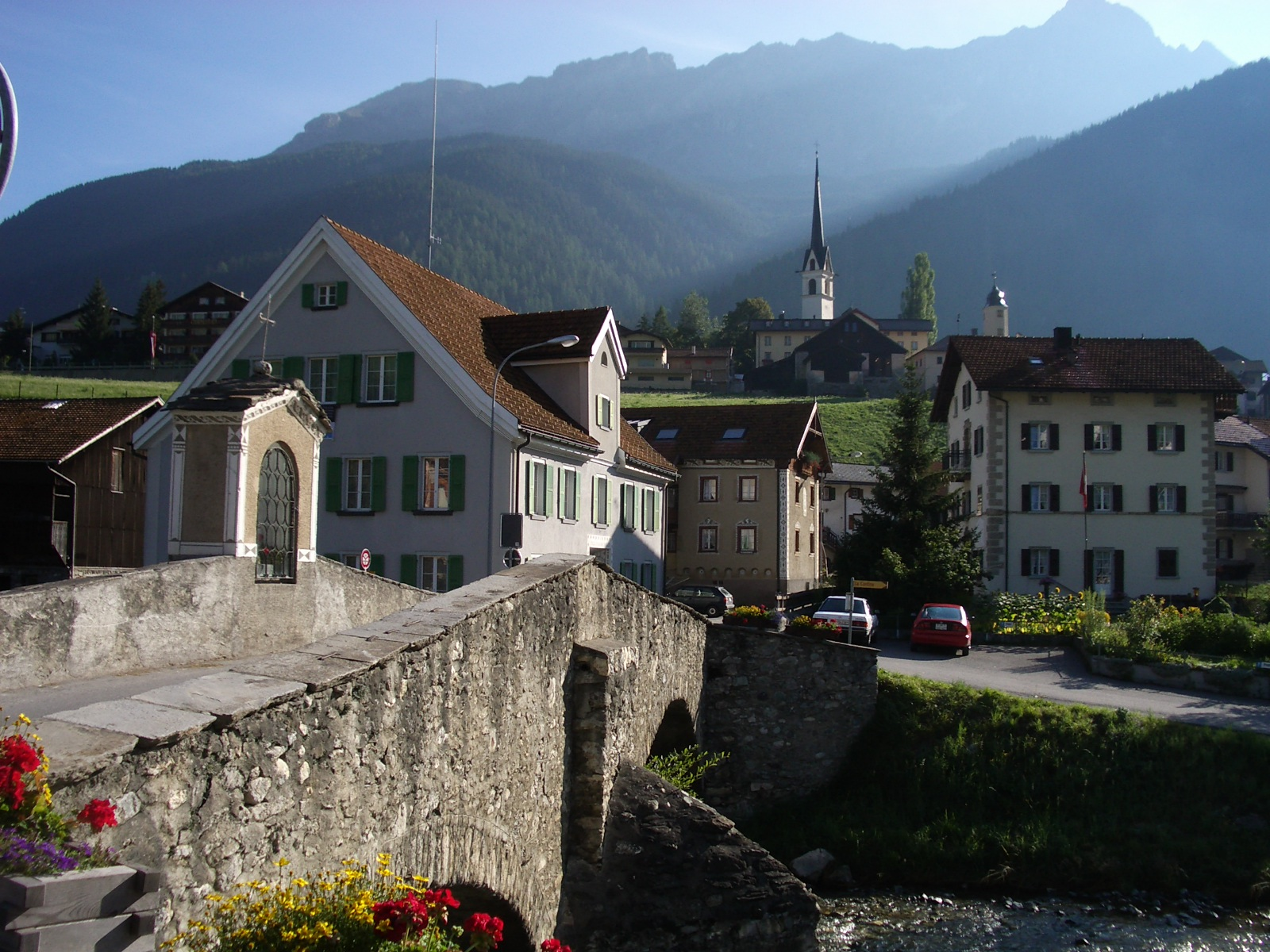 Die Brücke "Punt Crap" in Savognin, Graubünden, SwitzerlandRumantsch: La Punt Crap a Savognin, Grischun, Svizra